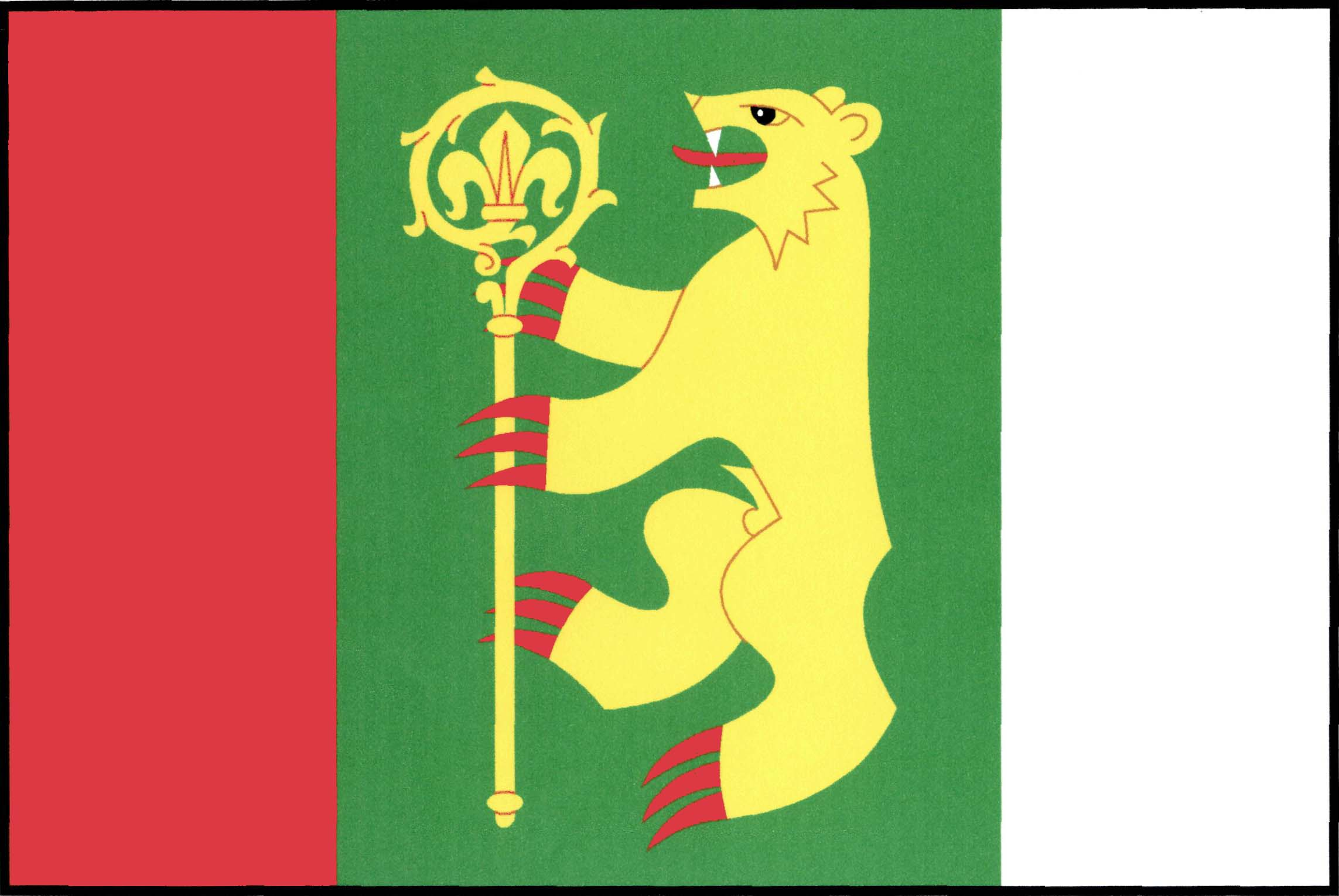 Vlajka obce Podveky